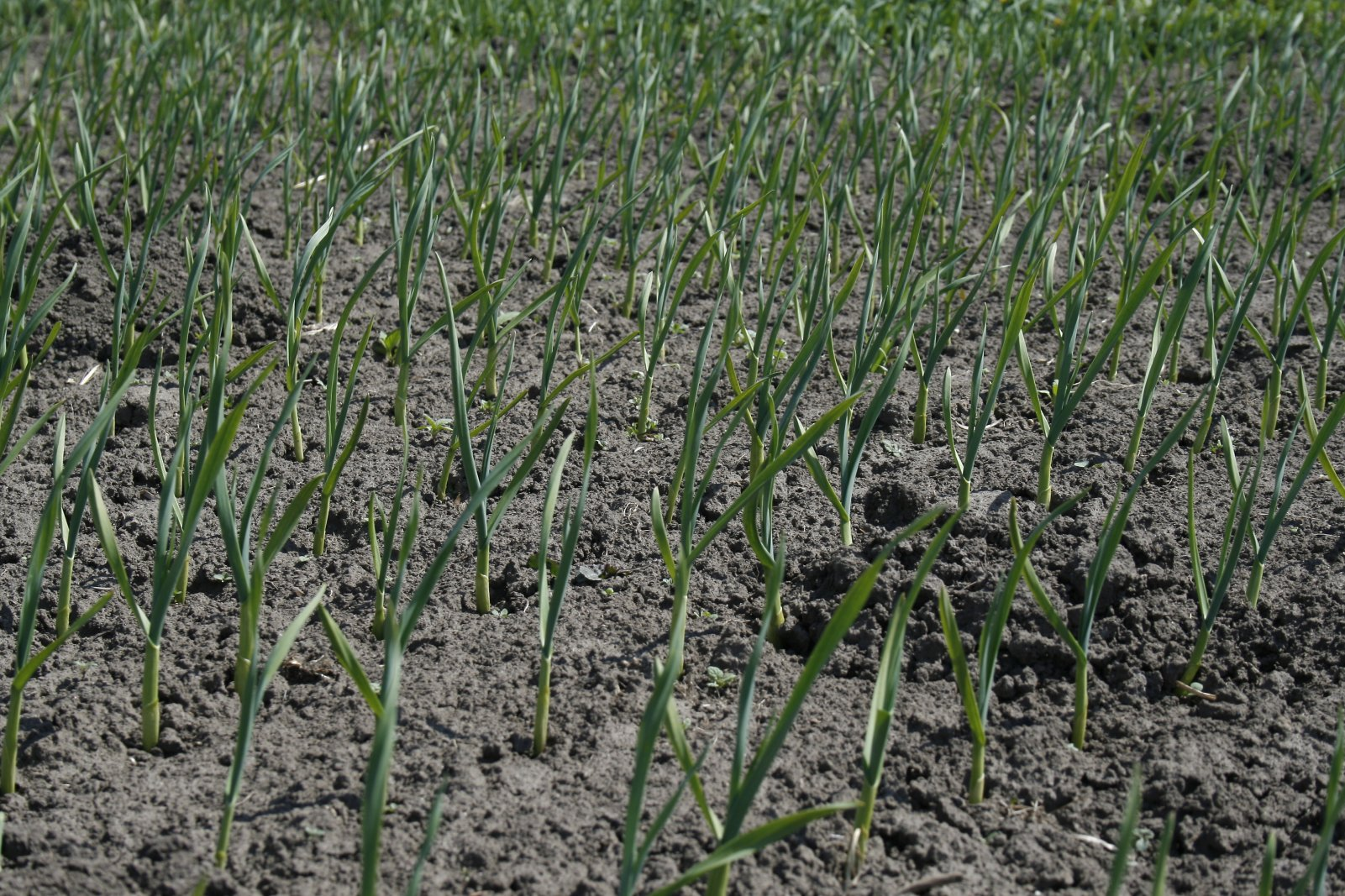 Озимий часник навесні.